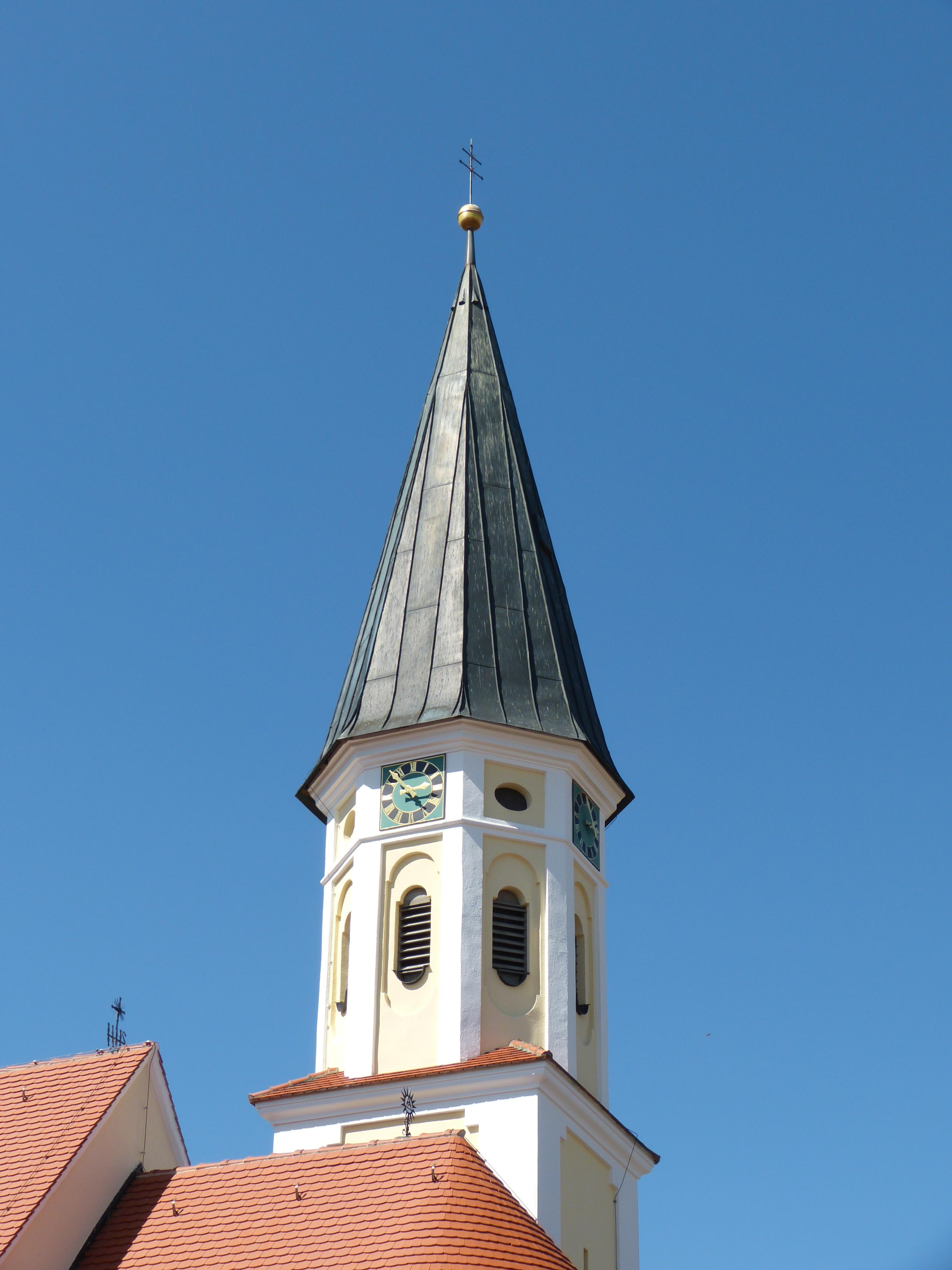 St. Ulrich in Erisried, Landkreis Unterallgäu, Bayern